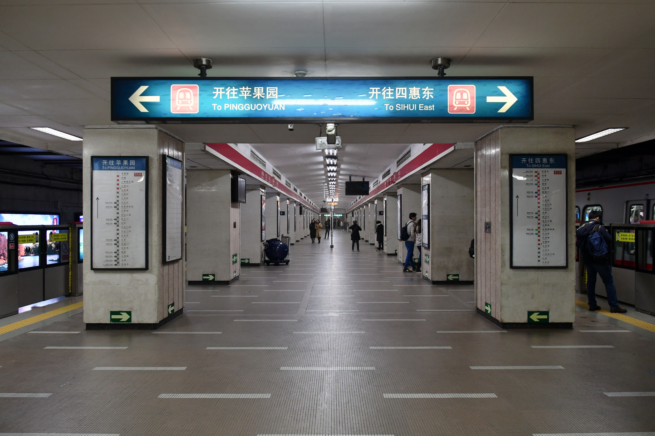 北京地铁1号线玉泉路站岛式站台